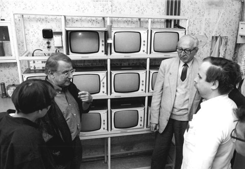 Nervenklinik Waldheim, Untersuchungskommission ADN-Grubitzsch 15.6.90 Leipzig: Nervenklinik Waldheim- Eine gegenwärtig tätige Untersuchungskommission, der unter Leitung von OMR Prof. Ehrig Lange (3.v.l.) auch Prof. Dr. Wilfried Rasch (2.v.l.) der der FU Berlin (West) angehört, stellte hinreichende Verdachtsmomente für die Mißhandlung von Patienten und den Mißbrauch durch aufgelösten Staatssicherheitsdienst fest. Damit scheinen sich gleichlautende Berichte des "Stern" zu bestätigen. Von der Zentralen Überwachungsstelle aus konnten die Insassen der Anstalt auf 10 Monitoren ständig beobachtet werden.